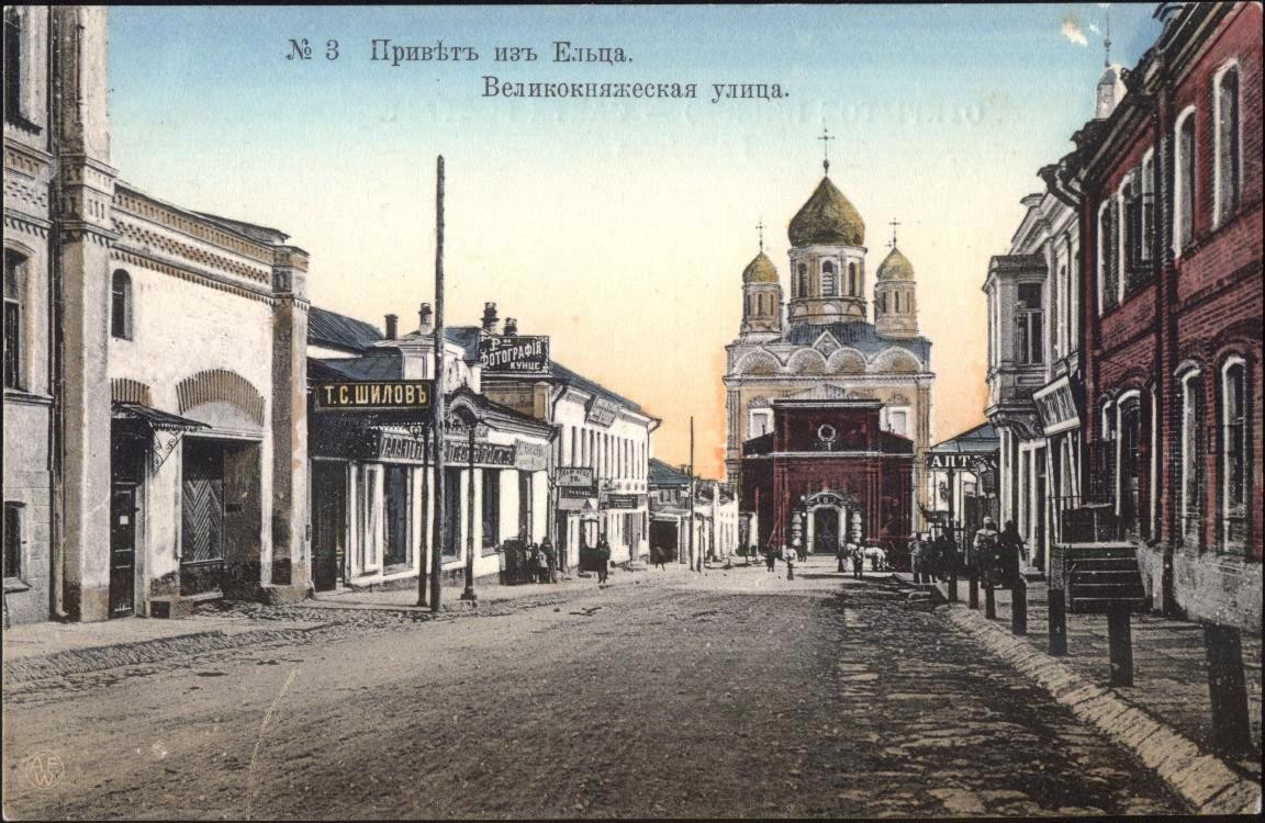 Елец. Великокняжеская улица. Цветная открытка начала 20 века